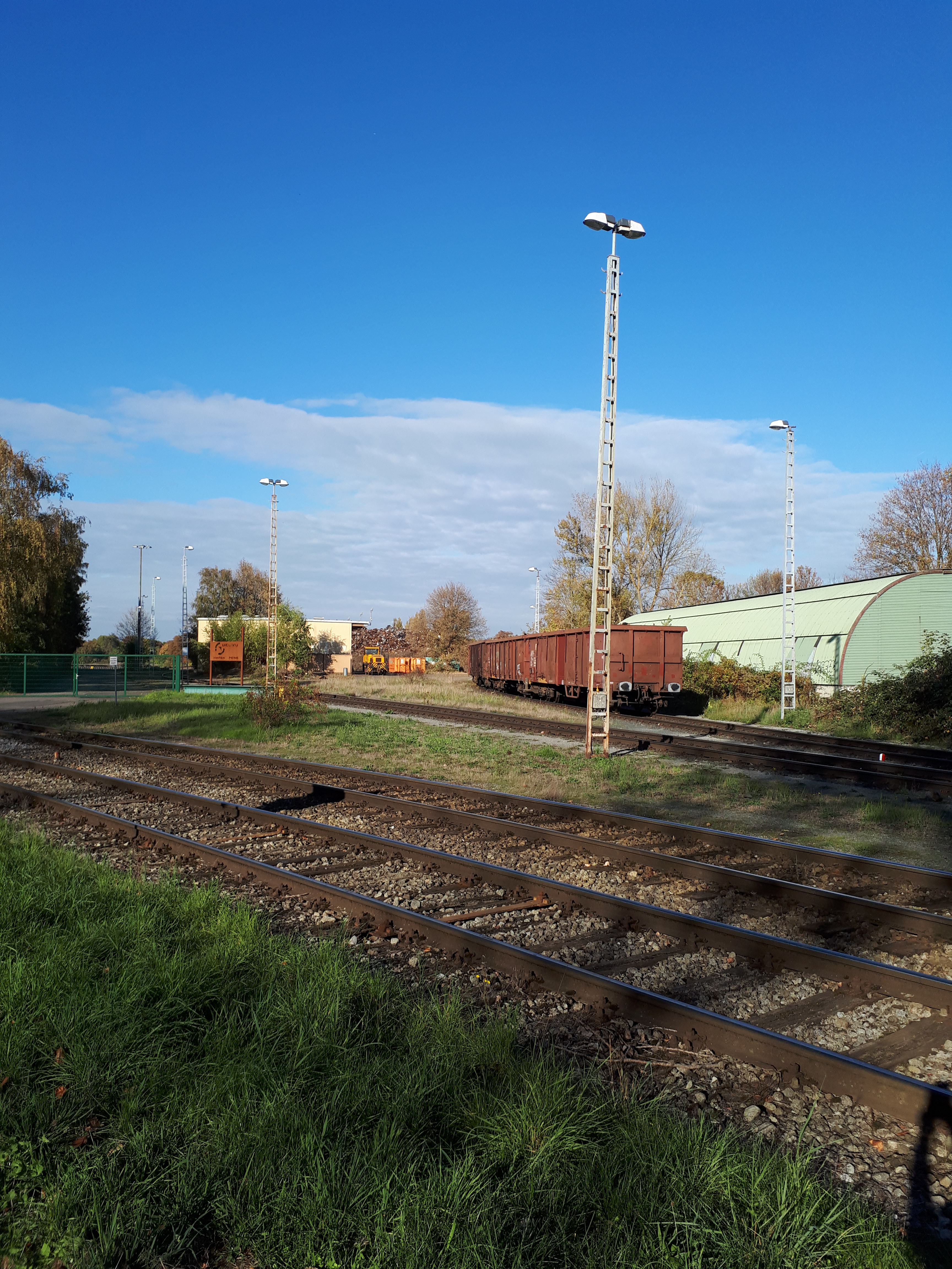 Hafen Peine: Bahnanlagen